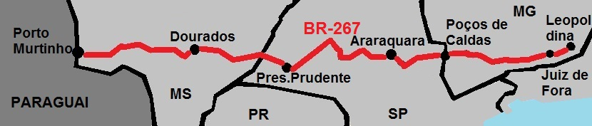 BR-267